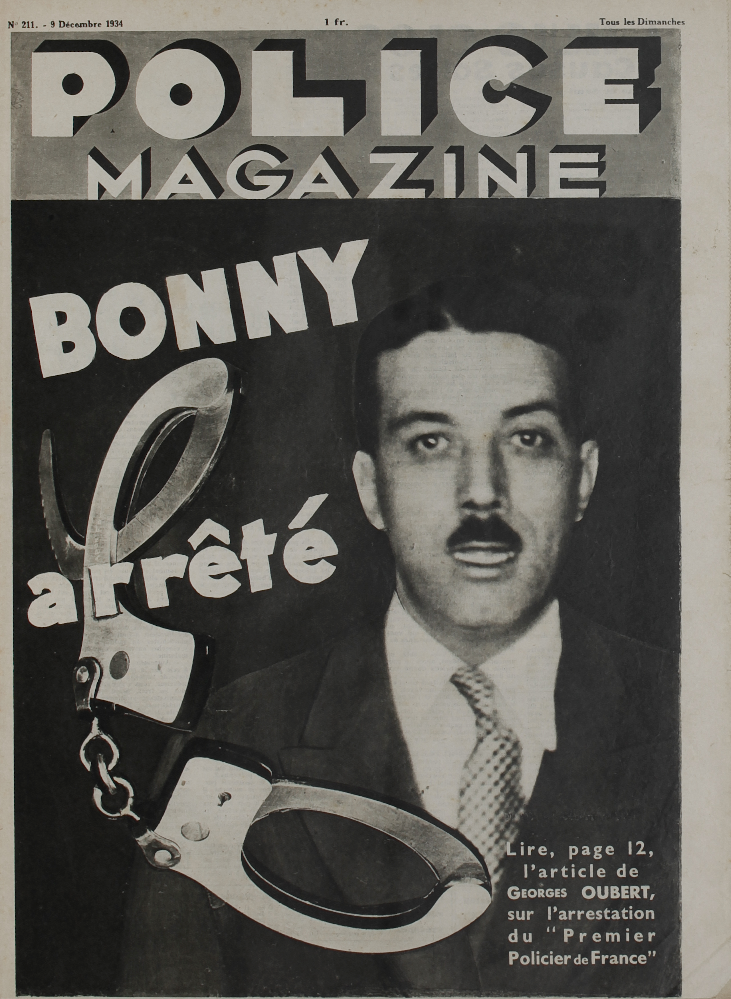 La une de magazine Police Magazine du 9 décembre 1934 titre sur la première arrestation de l'inspecteur Pierre Bonny.